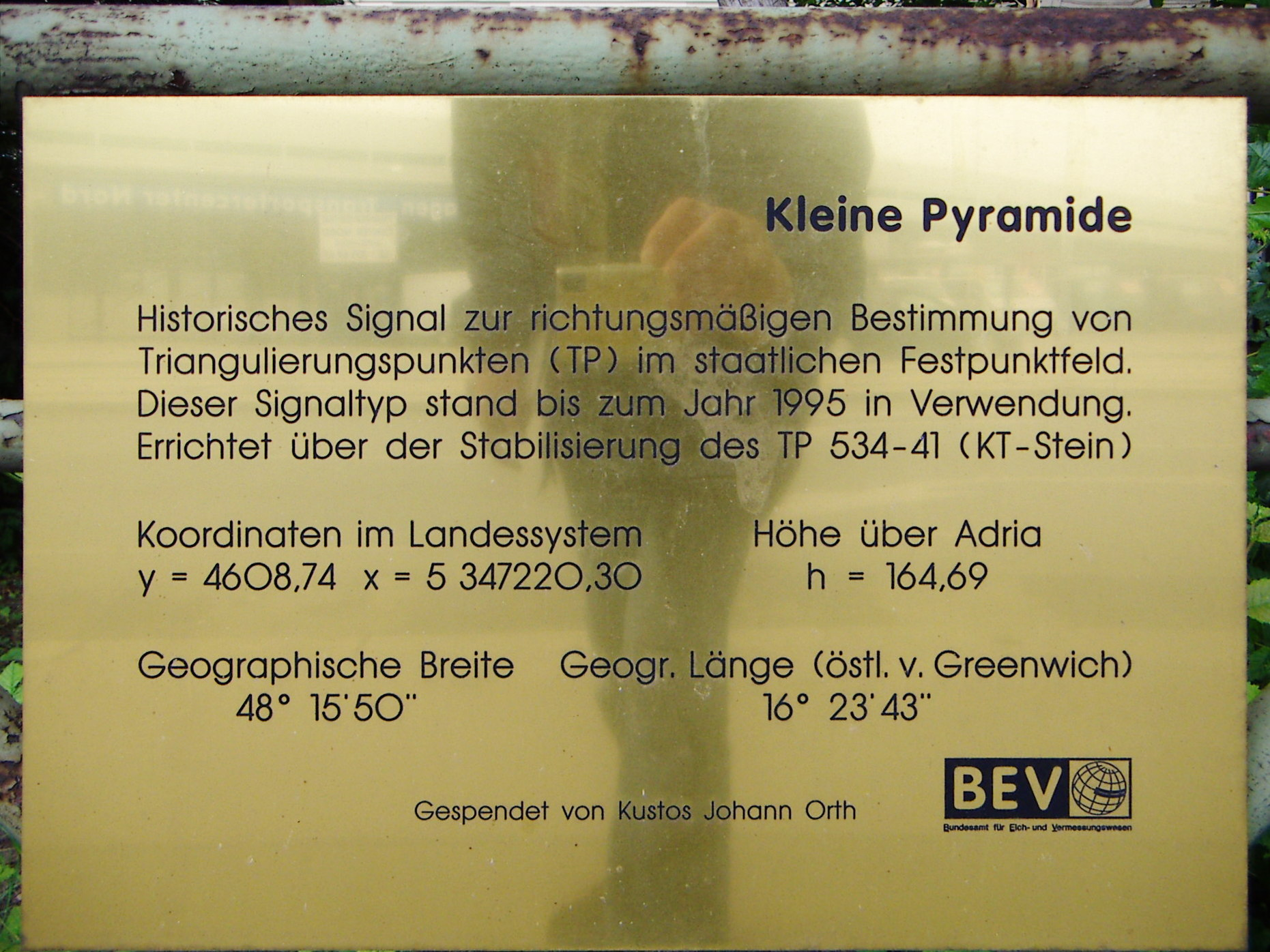 Beschreibung der Kleinen Pyramide als Signal im Festpunktfeld, Österreich, Bezirksmuseum Floridsdorf, Wien